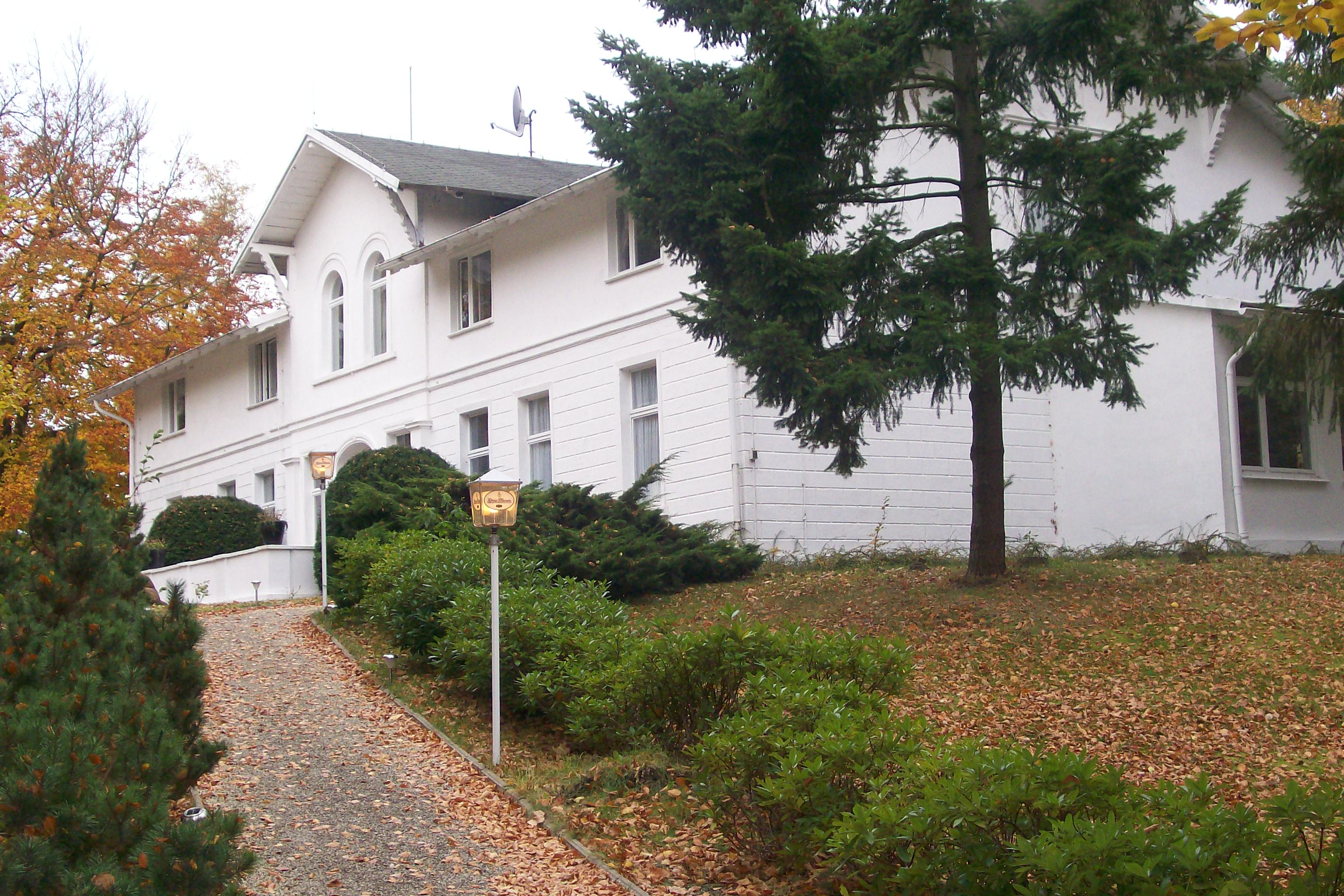 Das Weiße Schloss in Heringsdorf war dort das erste Gästequartier.